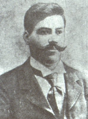 Goce_Delcev.jpg